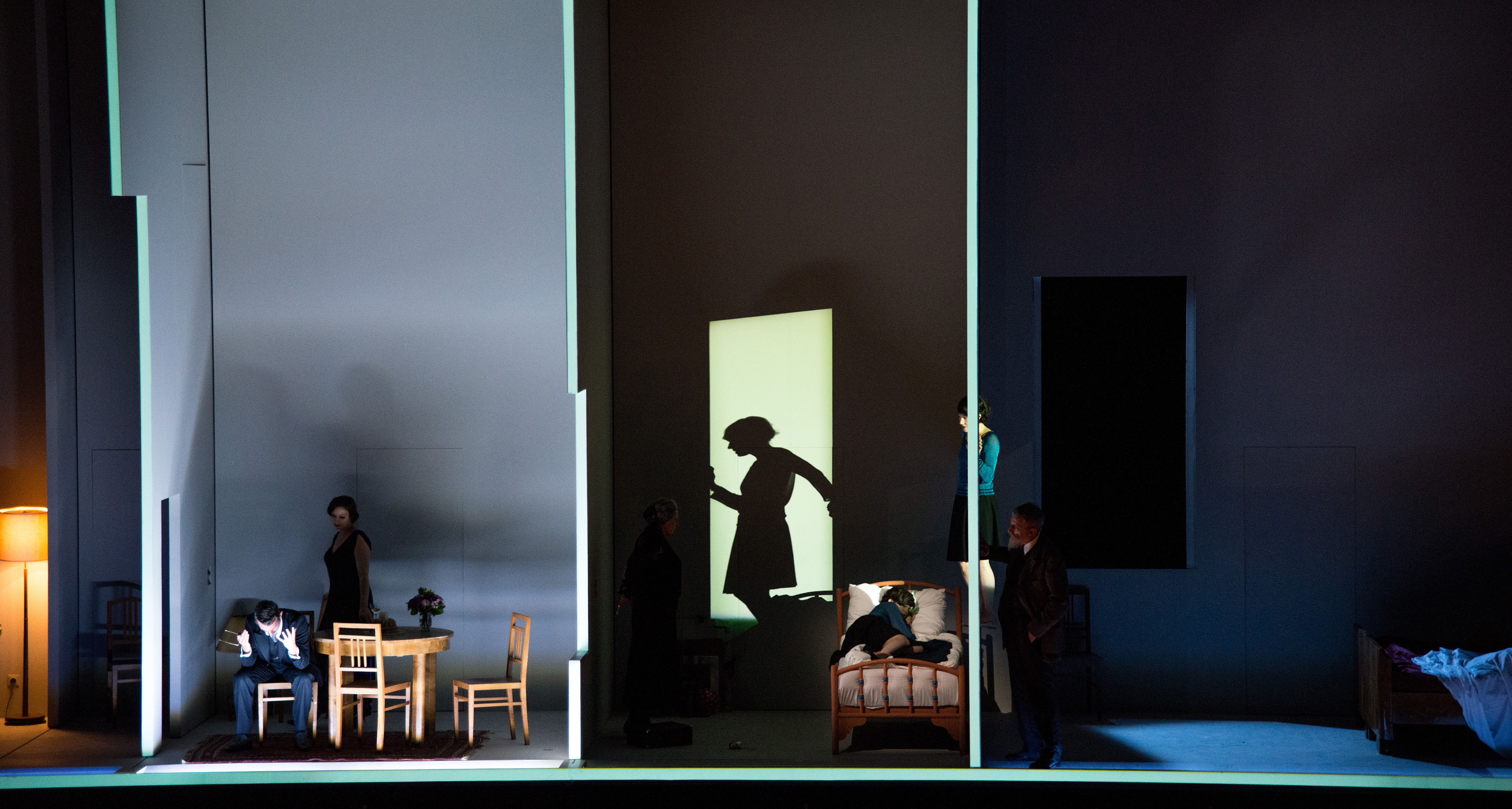 Charlotte Salomon, opera by Marc-André Dalbavie, Salzburg Festival, 2014